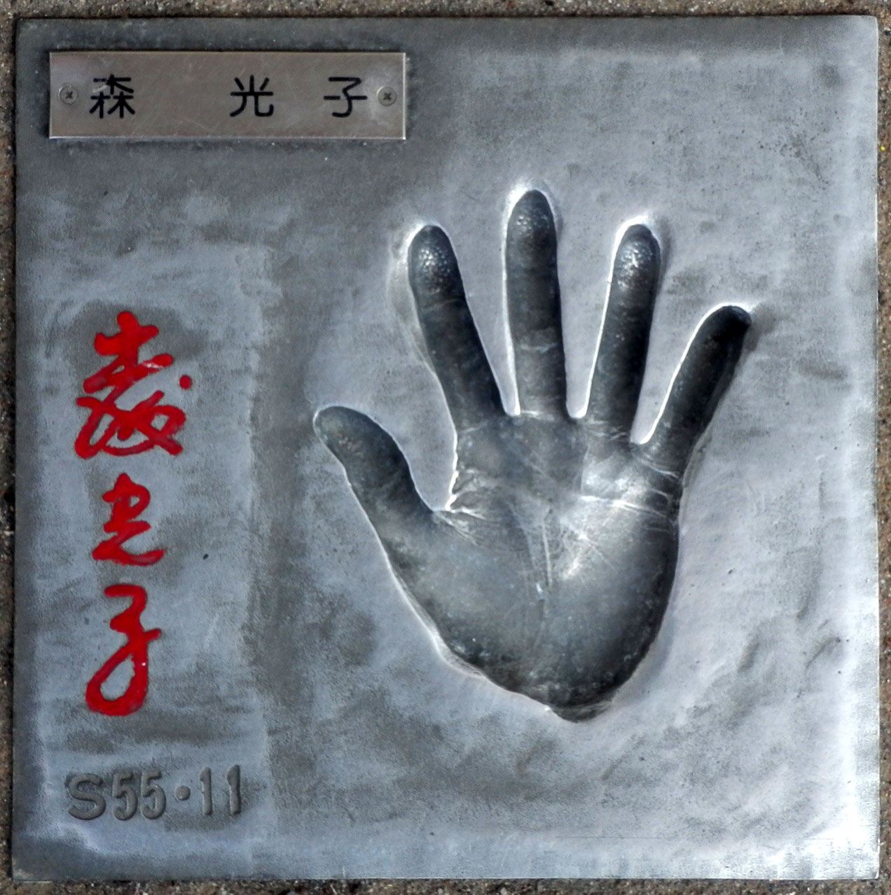 浅草公会堂（浅草オレンジ通り）「スターの手形」より